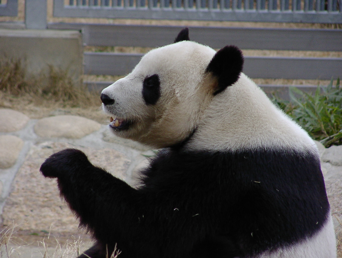 Panda calling you.